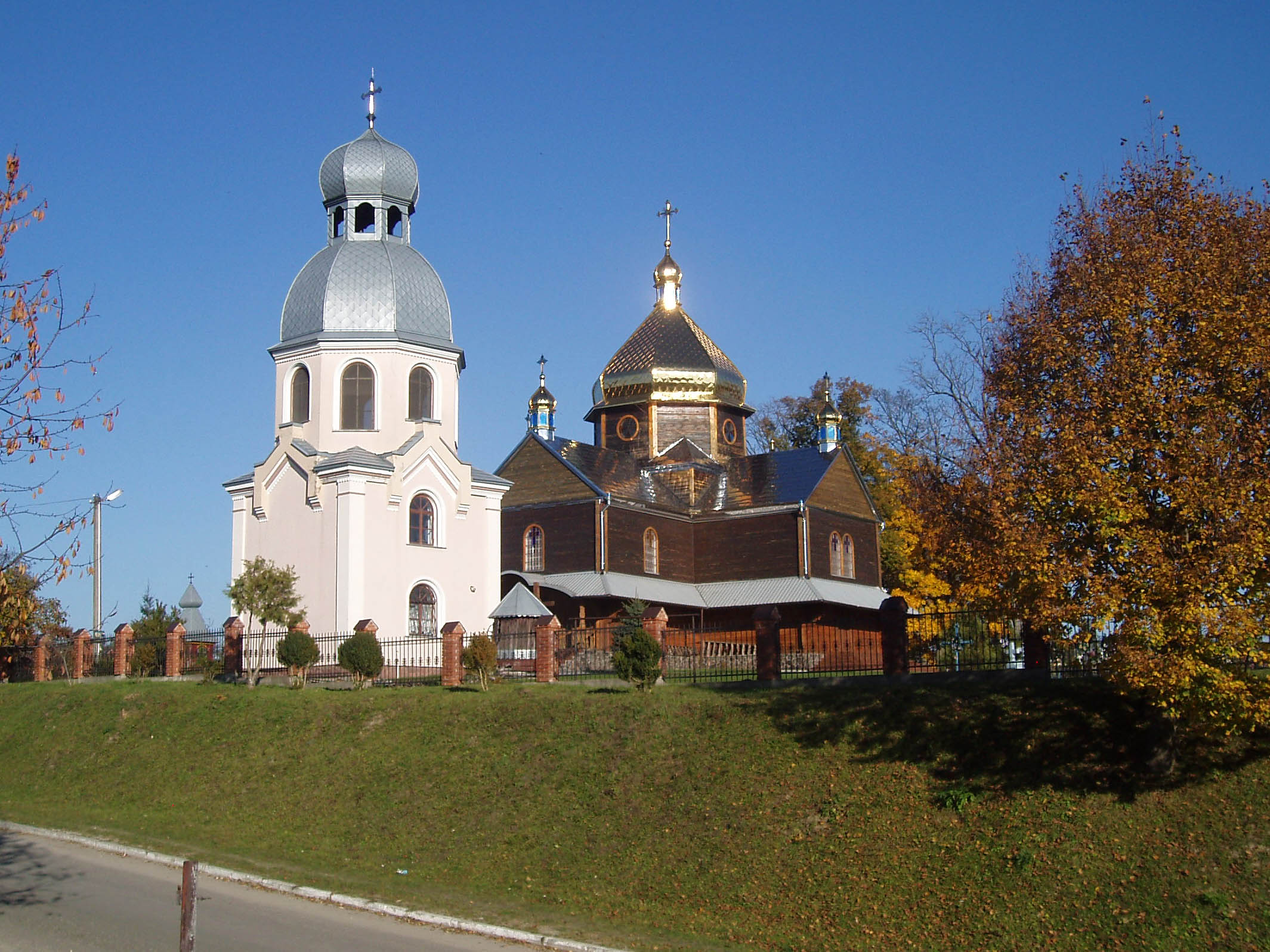 Церква у с. Ясниська Яворівського району. Збудована 1900 року за проектом Василя Нагірного (1848-1921}.